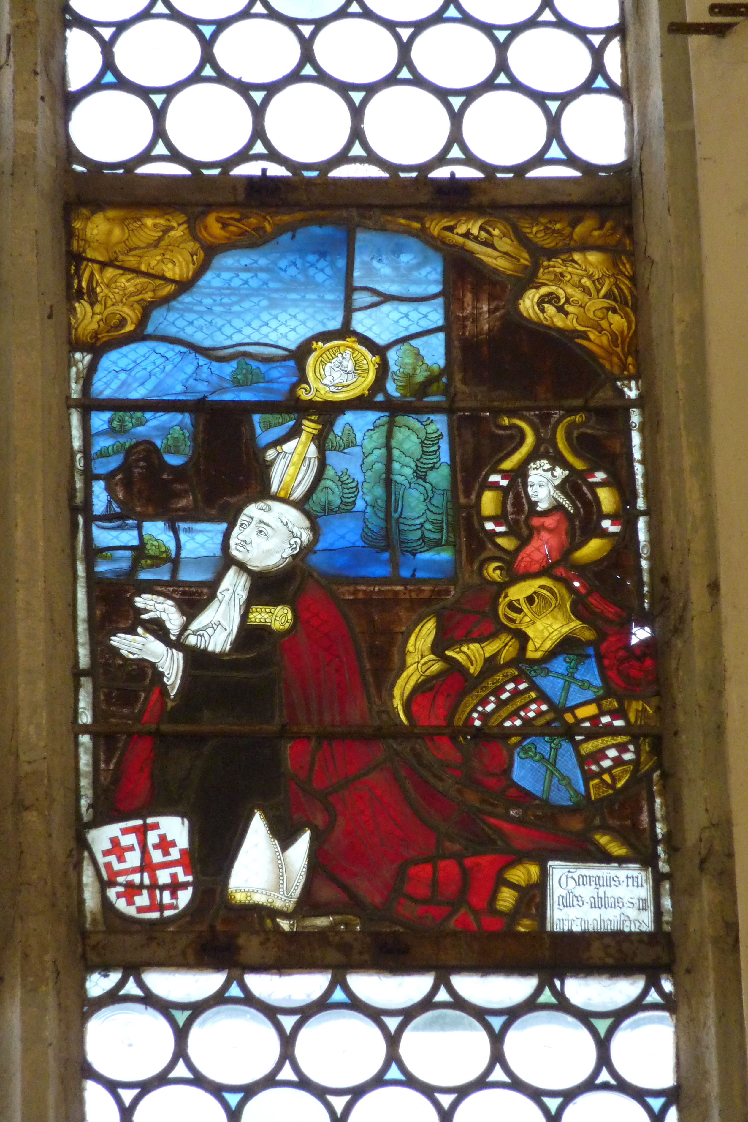 Evangelische Pfarrkirche, ehemalige Benediktinerklosterkirche St. Maria in Auhausen im Landkreis Donau-Ries (Bayern), mittleres Bleiglasfenster (rechte Scheibe) im Chor, Fragment der von Abt Georg Truchseß von Wetzhausen gestifteten Chorfenster von 1527, Darstellung: Abt Georg Truchseß von Wetzhausen